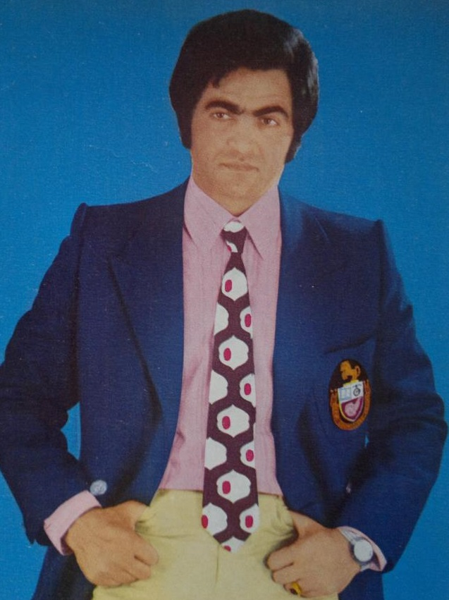 رضا فاضلی هنرپیشه و فعال سیاسی ایرانی تصویر چاپ شده در مجله ستاره سینما